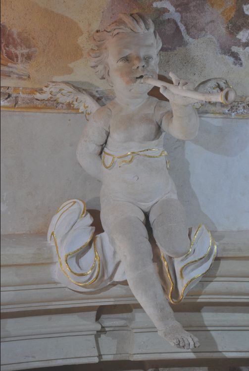 Hřbitovní kaple svatého Isidora, Křenov (okres Svitavy). Štuková figura v kapli od Jeana Baptista Dusarta.